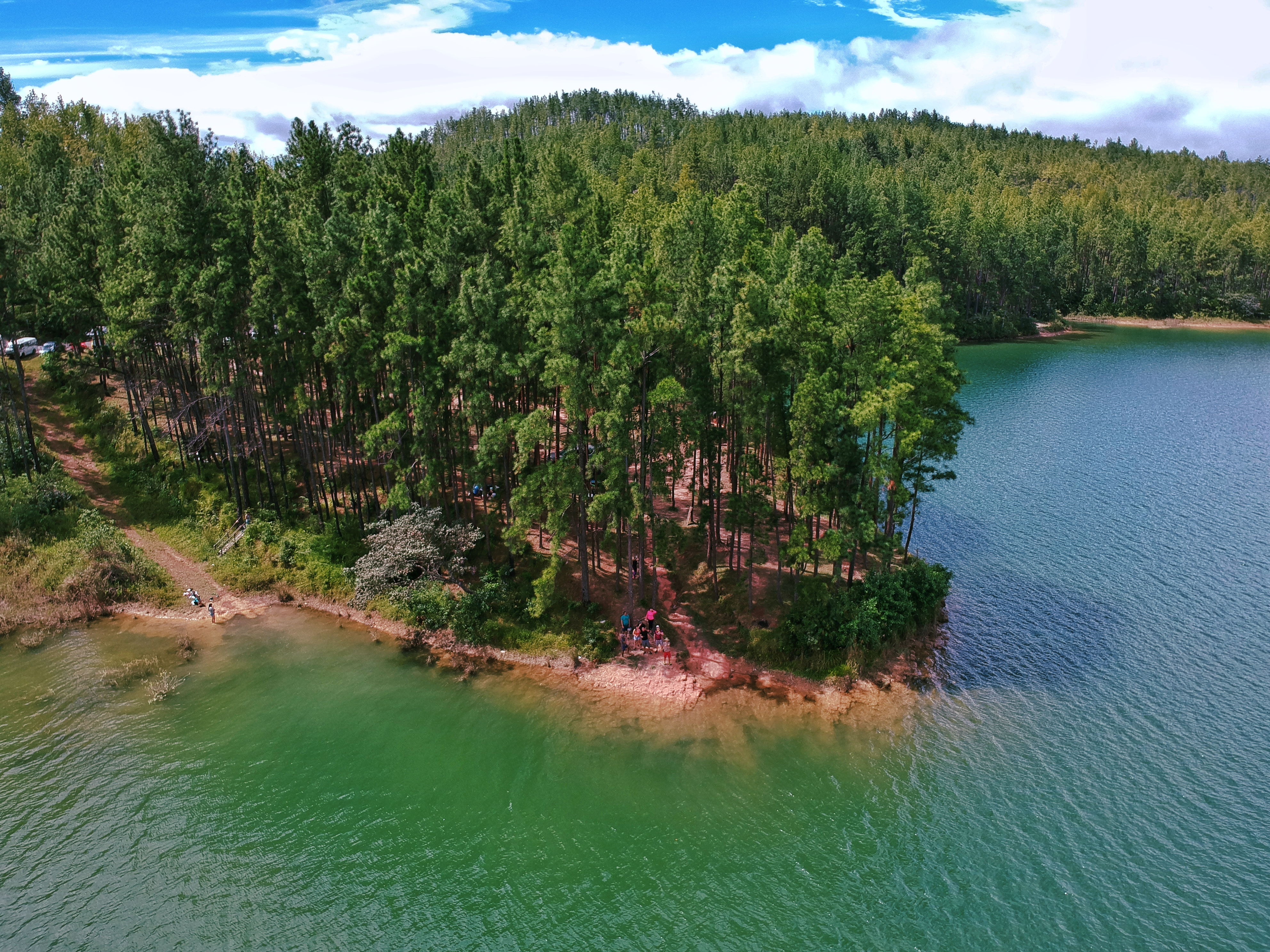 Toma Aérea junto al lago en la Yeguada, Panamá